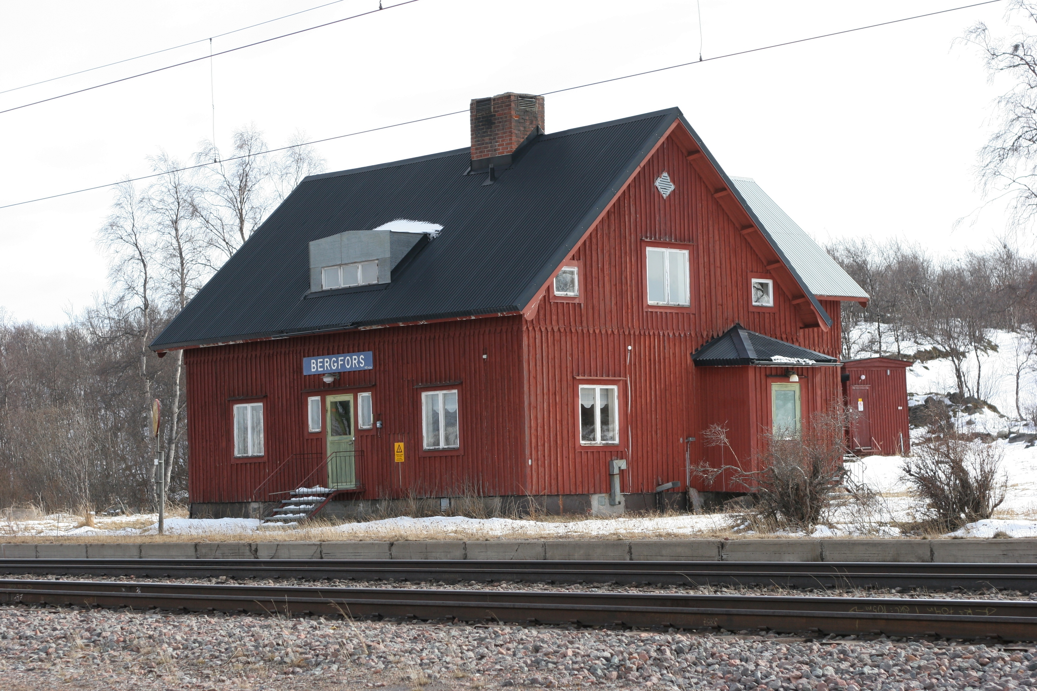 S - SJ - 7.0. L.30 Km 1453.00 - 2006-05-16 - Bergfors